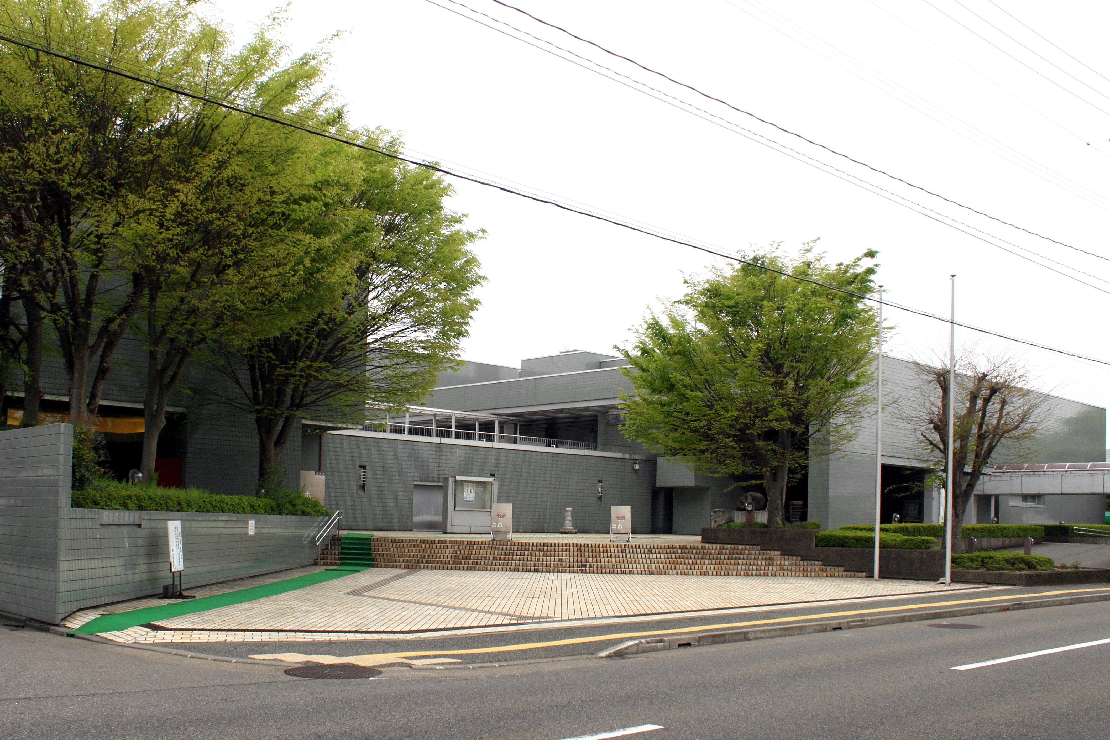 福井県立美術館